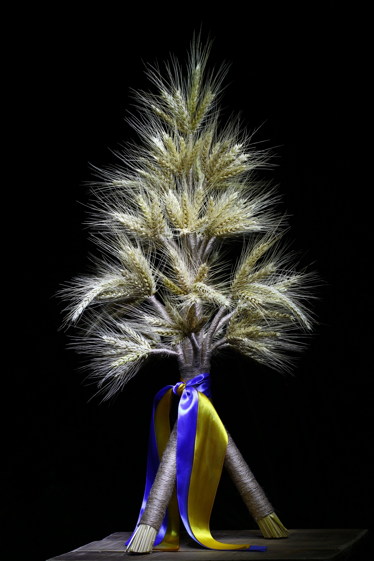 Дідух на темному фоні з жовто-блакитними стрічками